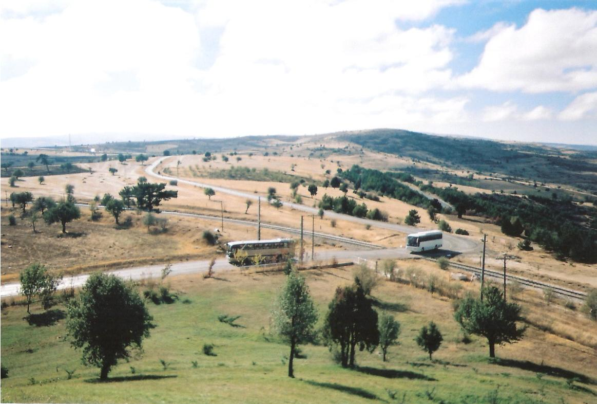 Dumlupınar Şehitliği View